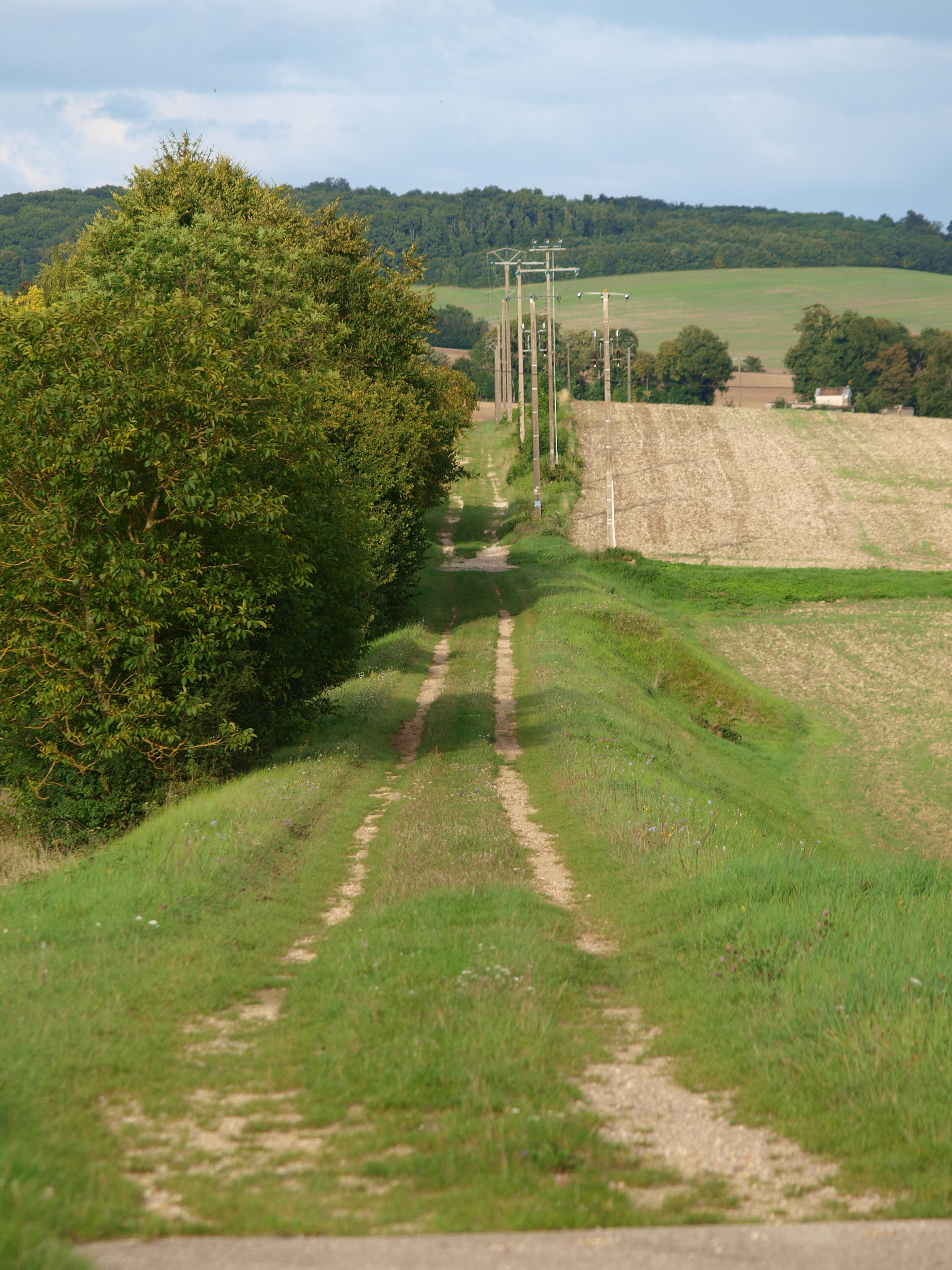 Thorigny-sur-Oreuse (Yonne, France) ; commune associée de Saint-Martin-sur-Oreuse : paléo voie ferroviaire de la Ligne Sens - Villeneuve-l'Archevêque et Saint-Maurice-aux-Riches-Hommes - Nogent-sur-Seine.